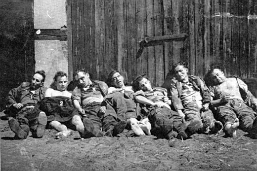 Oddział por. Waclawa Grabowskiego Puszczyka